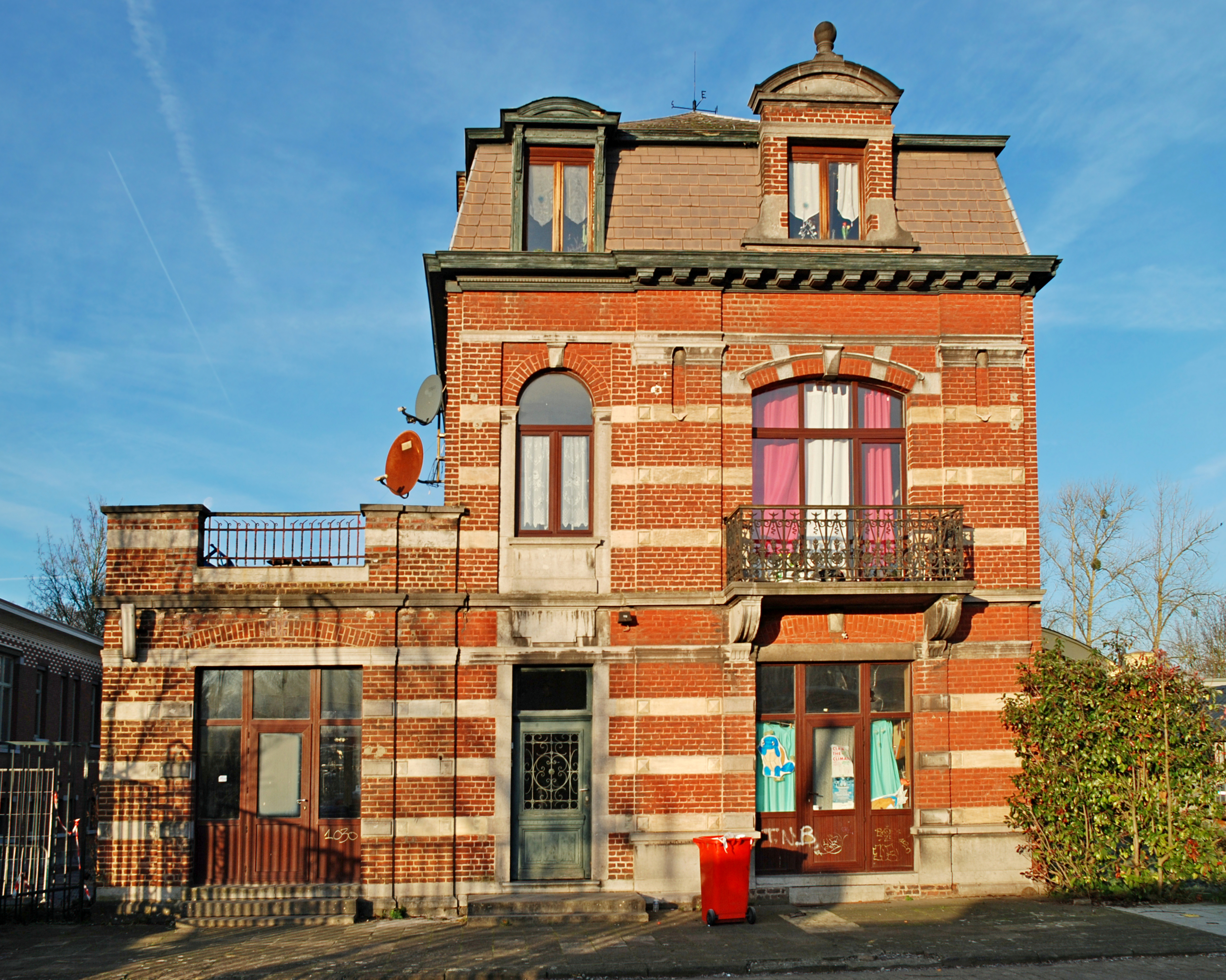 Belgique - Brabant wallon - Court-Saint-Étienne - Conciergerie de l'usine Henricot n°2, à côté des Grands bureaux